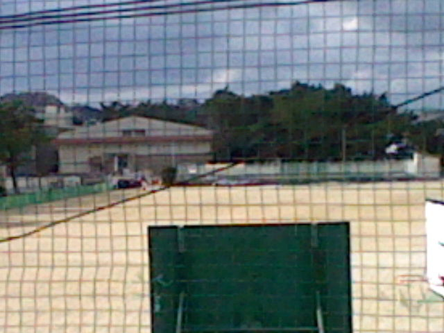 福岡市立百道中学校の校庭。